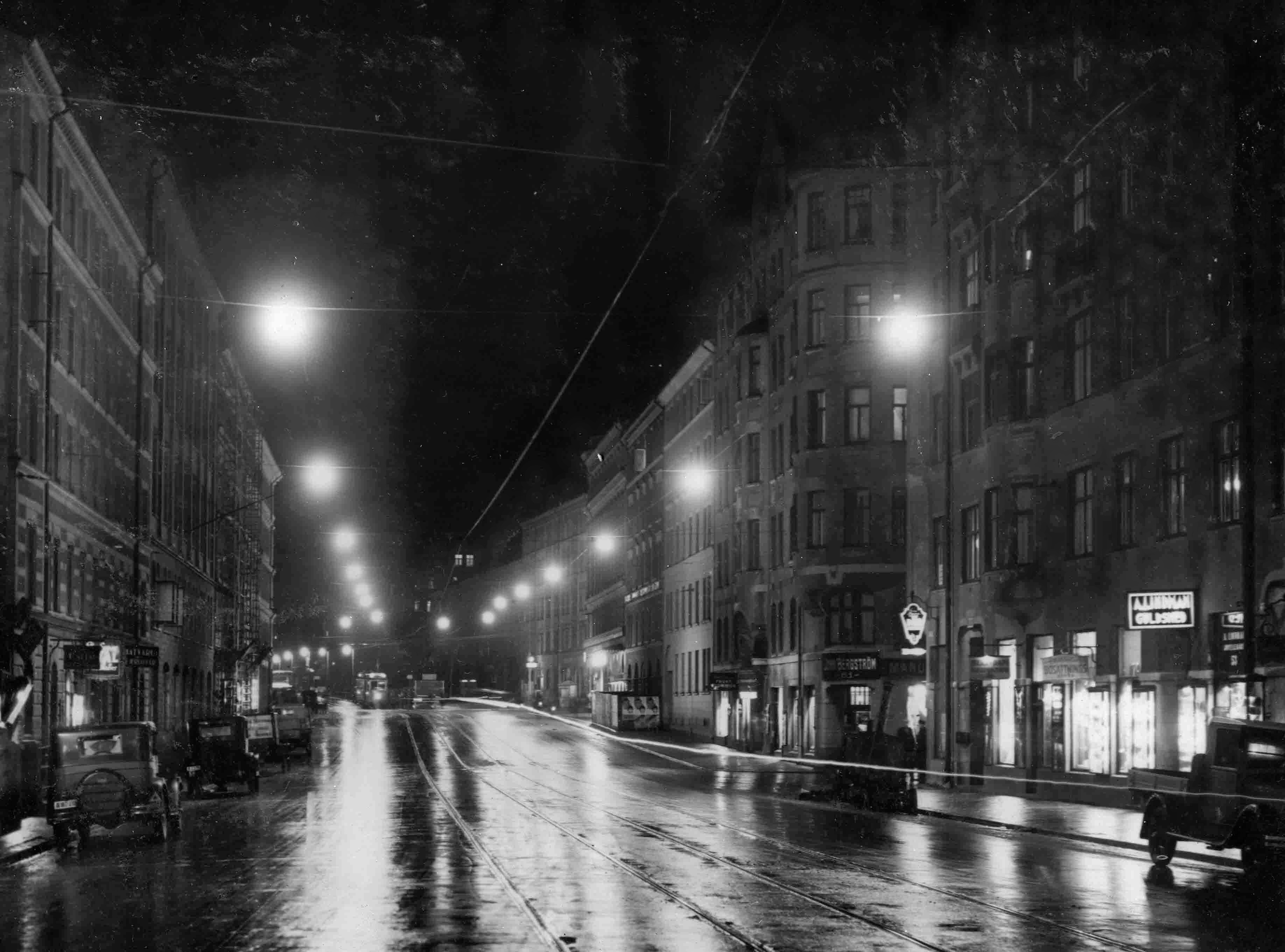 Belysningen på S:t Eriksgatan i Stockholm på 1930-talet.